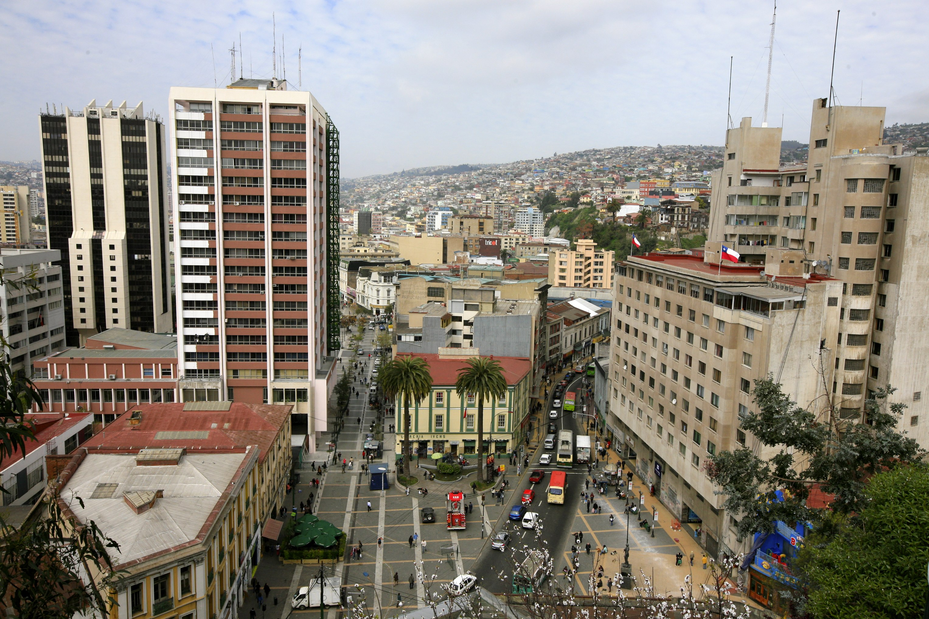 Plaza Aníbal Pinto, Valparaíso, Chile.